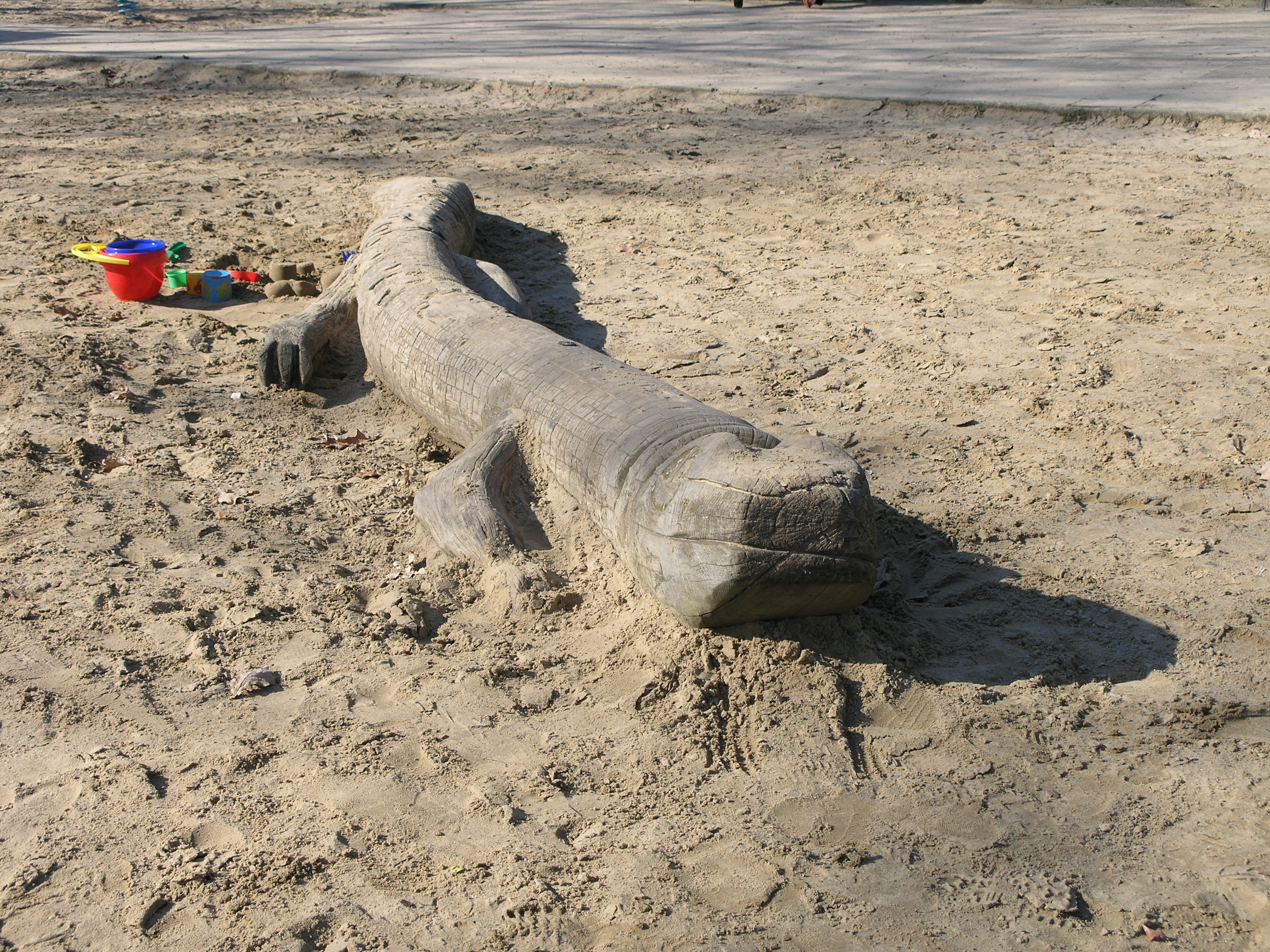 Holztier von Günter Schumann im Stadtpark Lichtenberg (4)